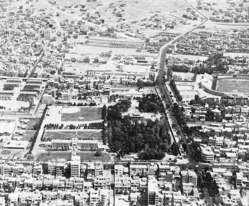 سفارت ایالات متحده آمریکا در خیابان روزولت (مفتح). ورزشگاه امجدیه نیز در سمت راست تصویر دیده می‌شود